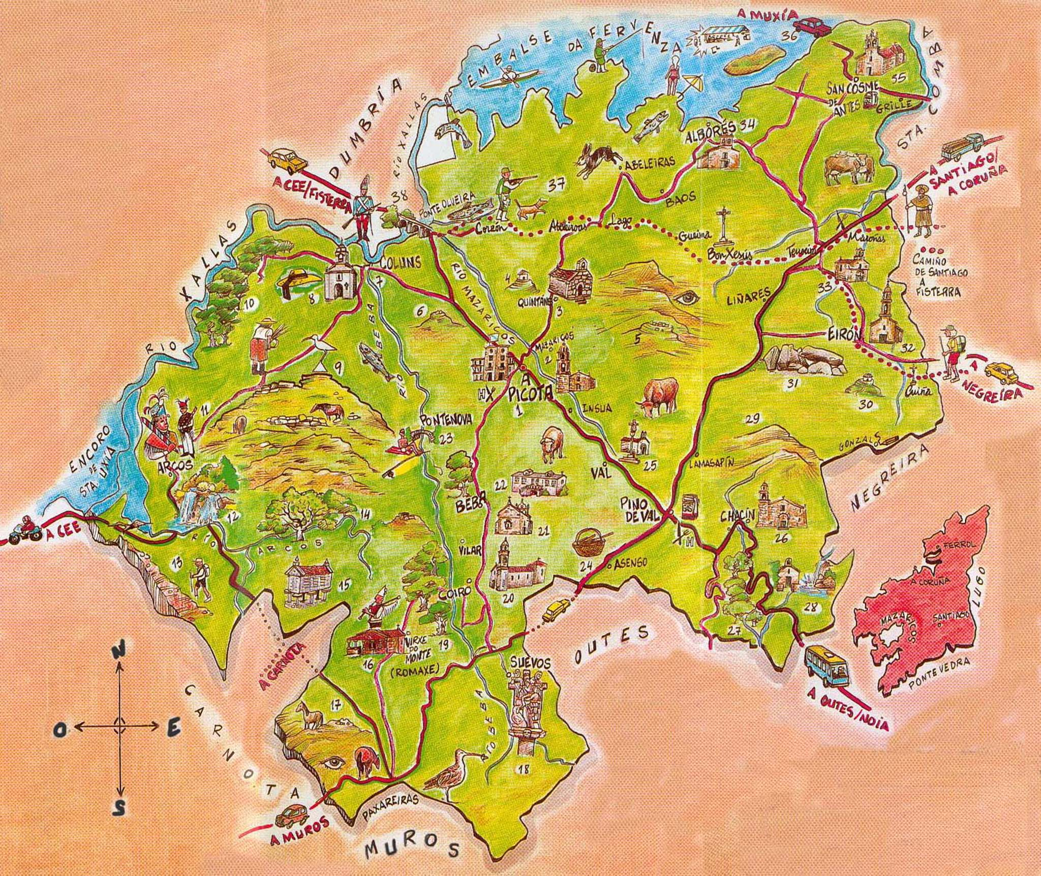 Mazaricos mapa geográfico